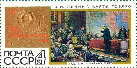 Почтовая марка СССР. 1967. 50 героических лет. Л. Шматько. Ленин у карты ГОЭЛРО. Номер в каталоге ЦФА 3553